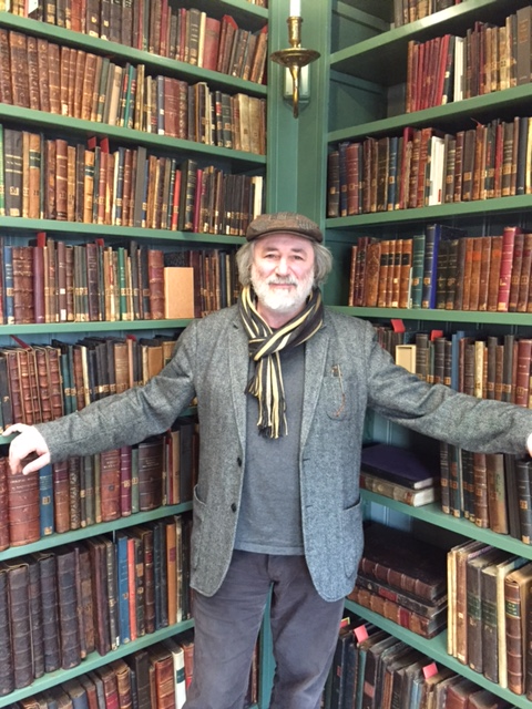 Семён Якерсон, семитолог, специалист по еврейским рукописям и инкунабулам